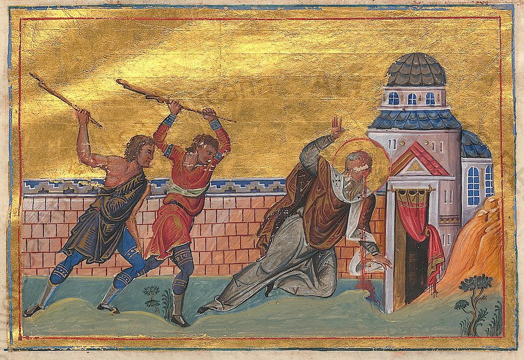 Сщмч. Автоном, еп. Вифинский. Миниатюра из Минология Василия II. 976 - 1025 гг. (Ватиканская б-ка)